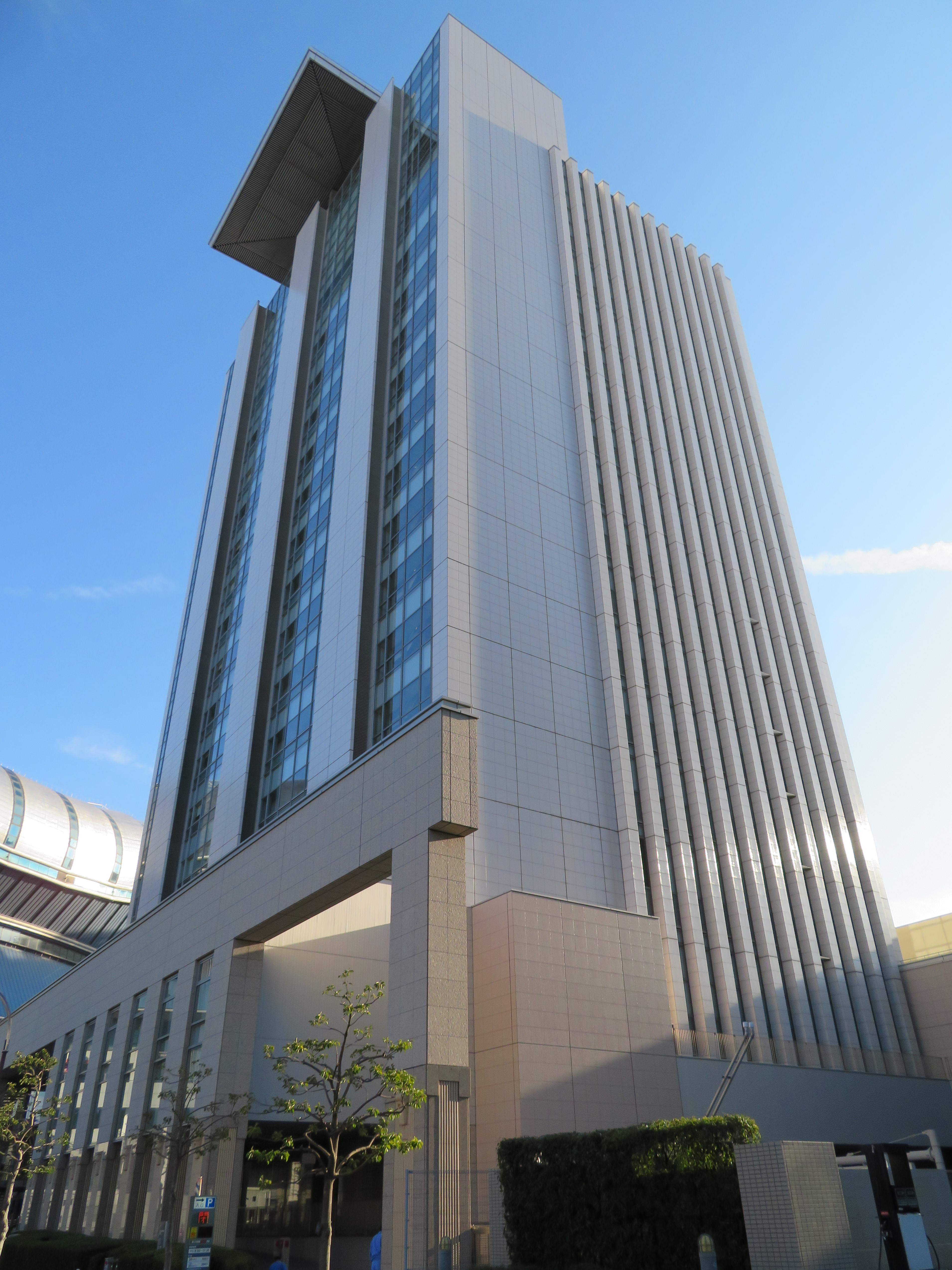 大阪市高速電気軌道本社